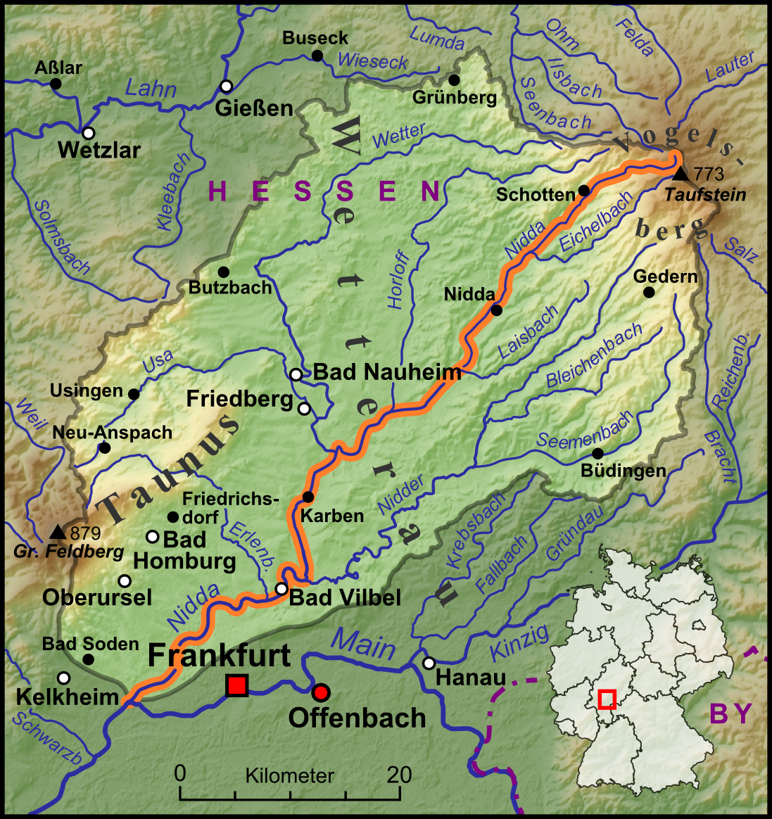 Die Nidda, ihre Nebenflüsse und das Wassereinzugsgebiet begrenzt durch die Wasserscheiden